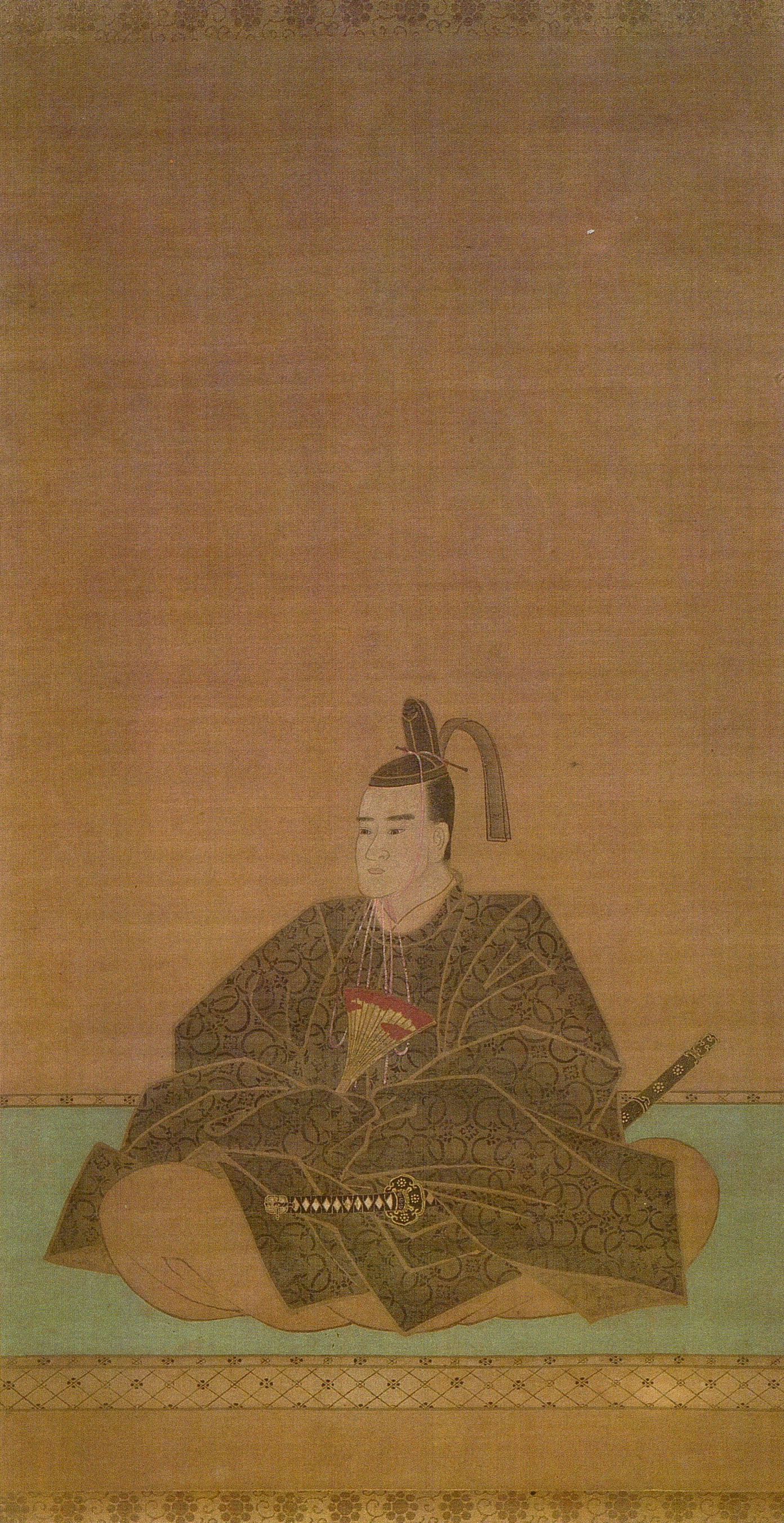 肥後熊本藩5代藩主・細川宗孝の肖像画。